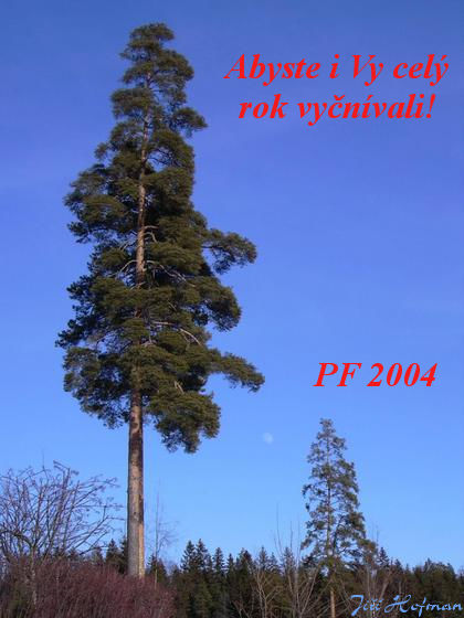 Novoročenka k roku 2004. (Ale byla poslána s ročním zpoděním.)Autorem fota a výtvarného zpracování je Miraceti.